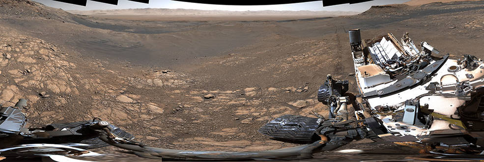 Panorama de la planète Mars réalisé par le rover Curiosity.